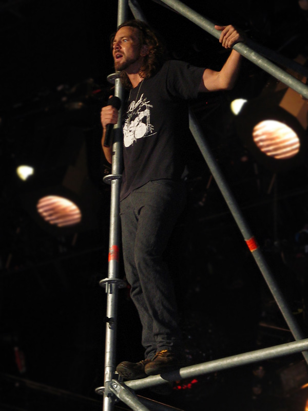 Eddie Vedder